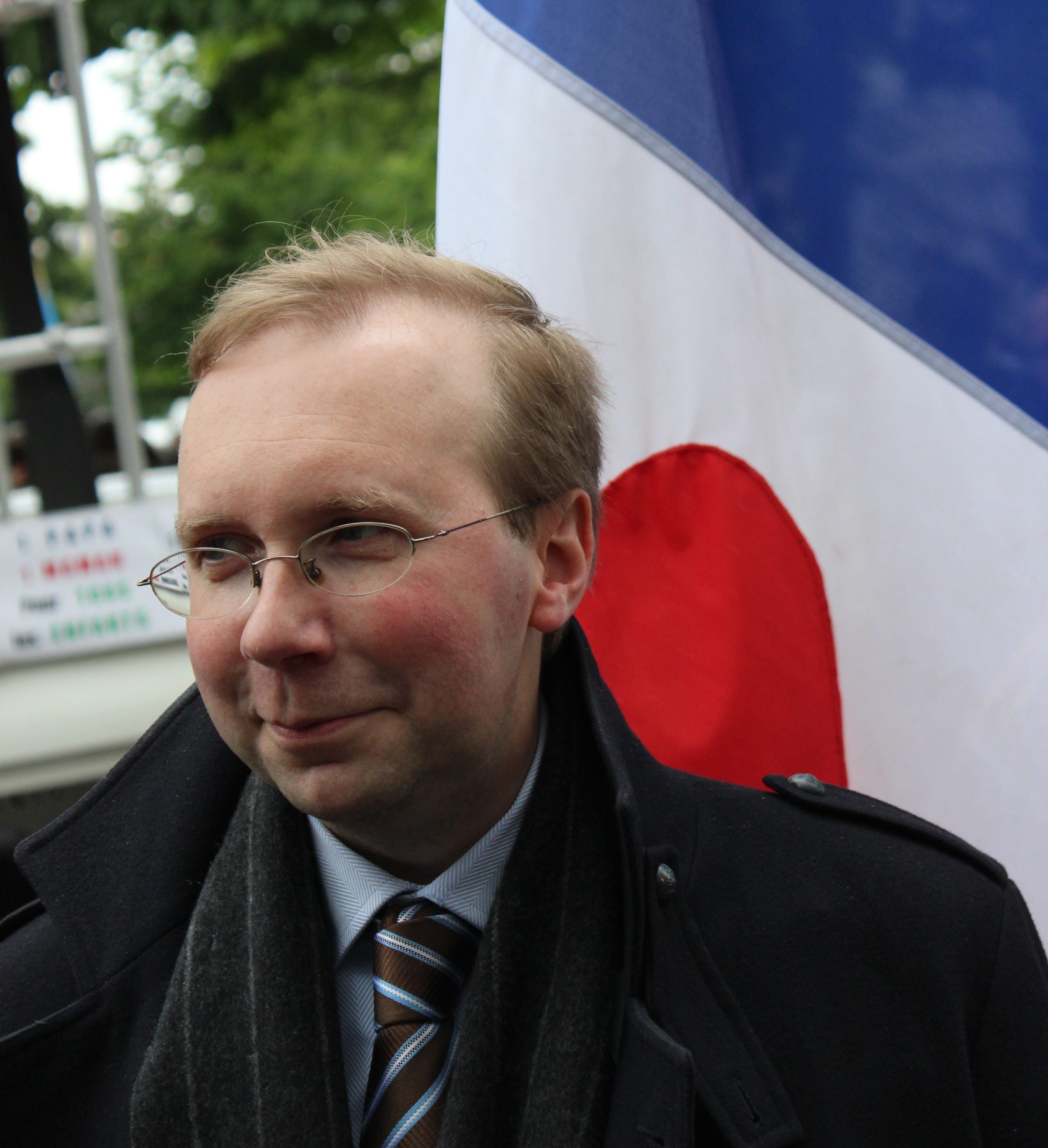 Alain Escada